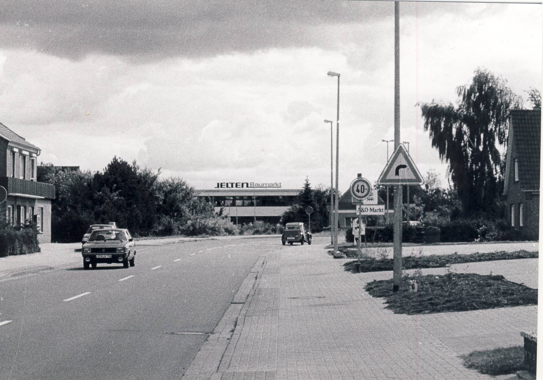 Blick auf die Koloniestraße in Moormerland von Norden her. Im Hintergrund der Jaumarkt Jelten, heutiger Standort der Freien Christlichen Schule Ostfriesland (FCSO)